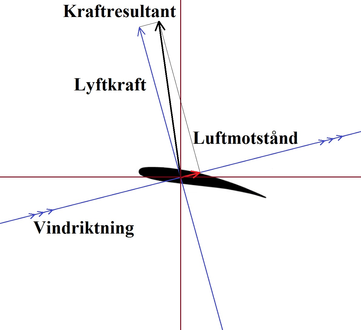 The forces affecting a rotor blade of a autogyro during autorotation.